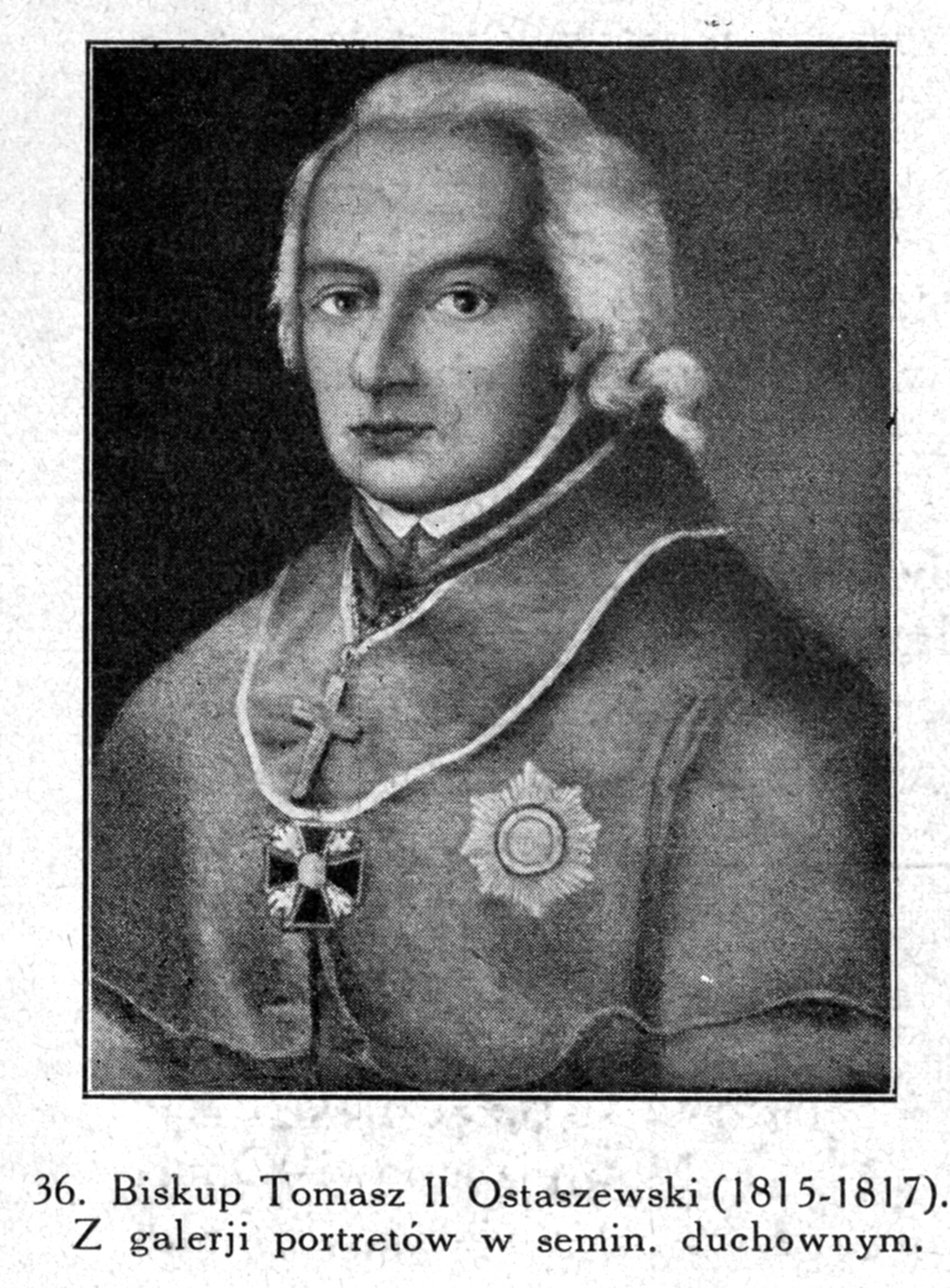 Tomasz Ostaszewski, Bishop of Płock (Poland) 1815-1817